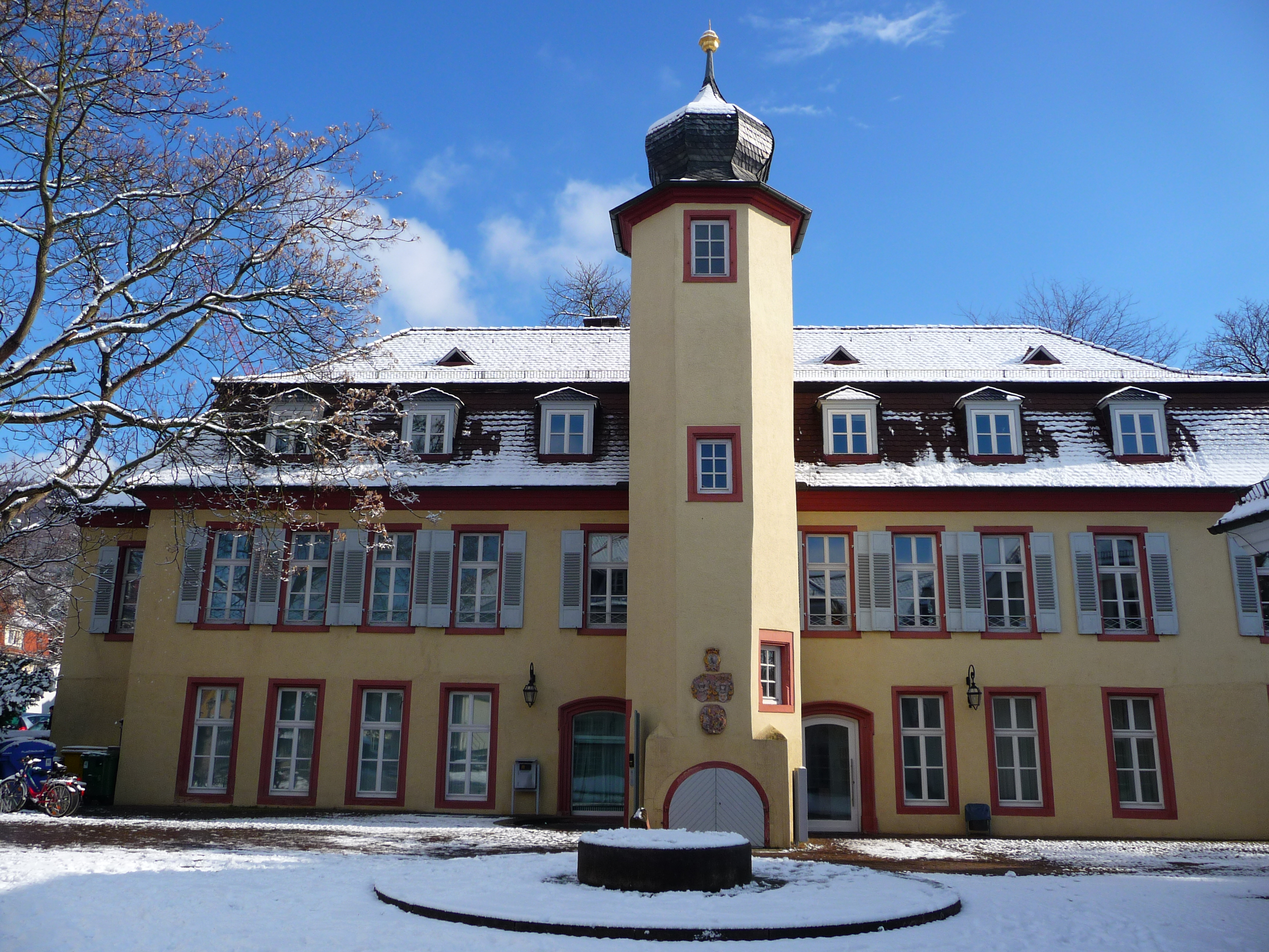 Schlößchen in Heidelberg-Handschuhsheim (Deutschland)